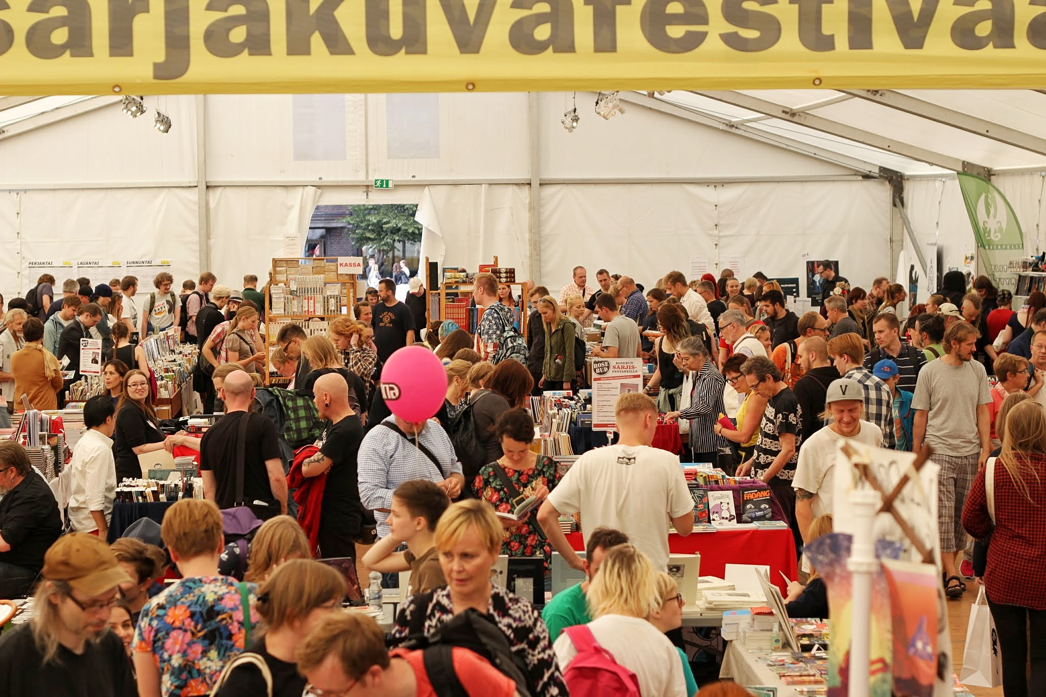 Helsingin Sarjakuvafestivaalit. Kuvaaja Jussi Pakkanen.